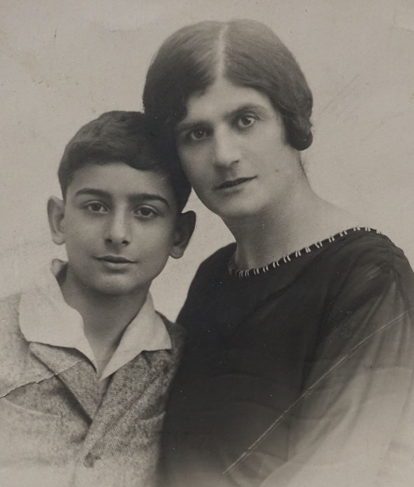 Berdjouhi et son fils Armen